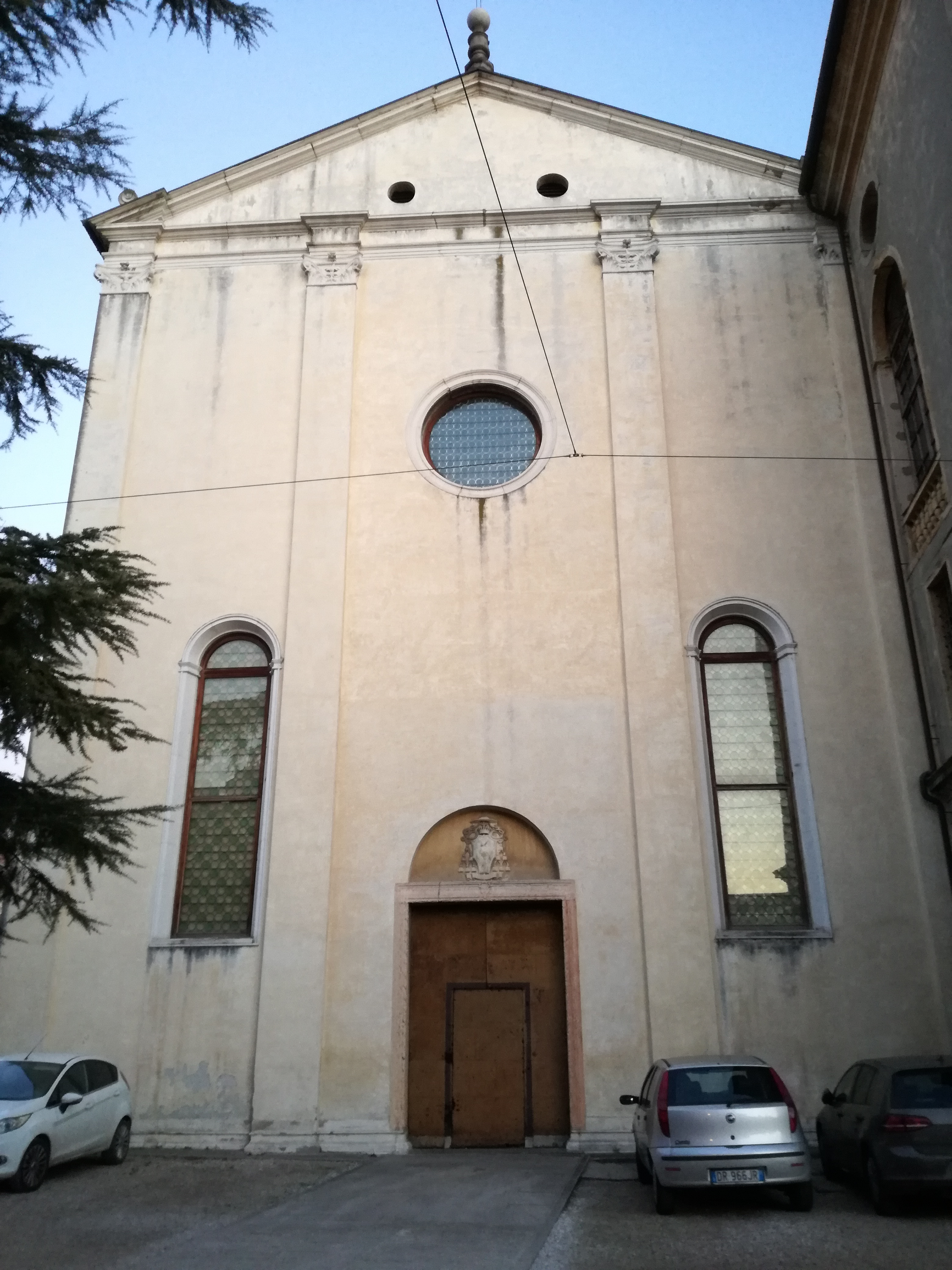 Facciata della chiesa di Santa Maria in Vanzo, Padova